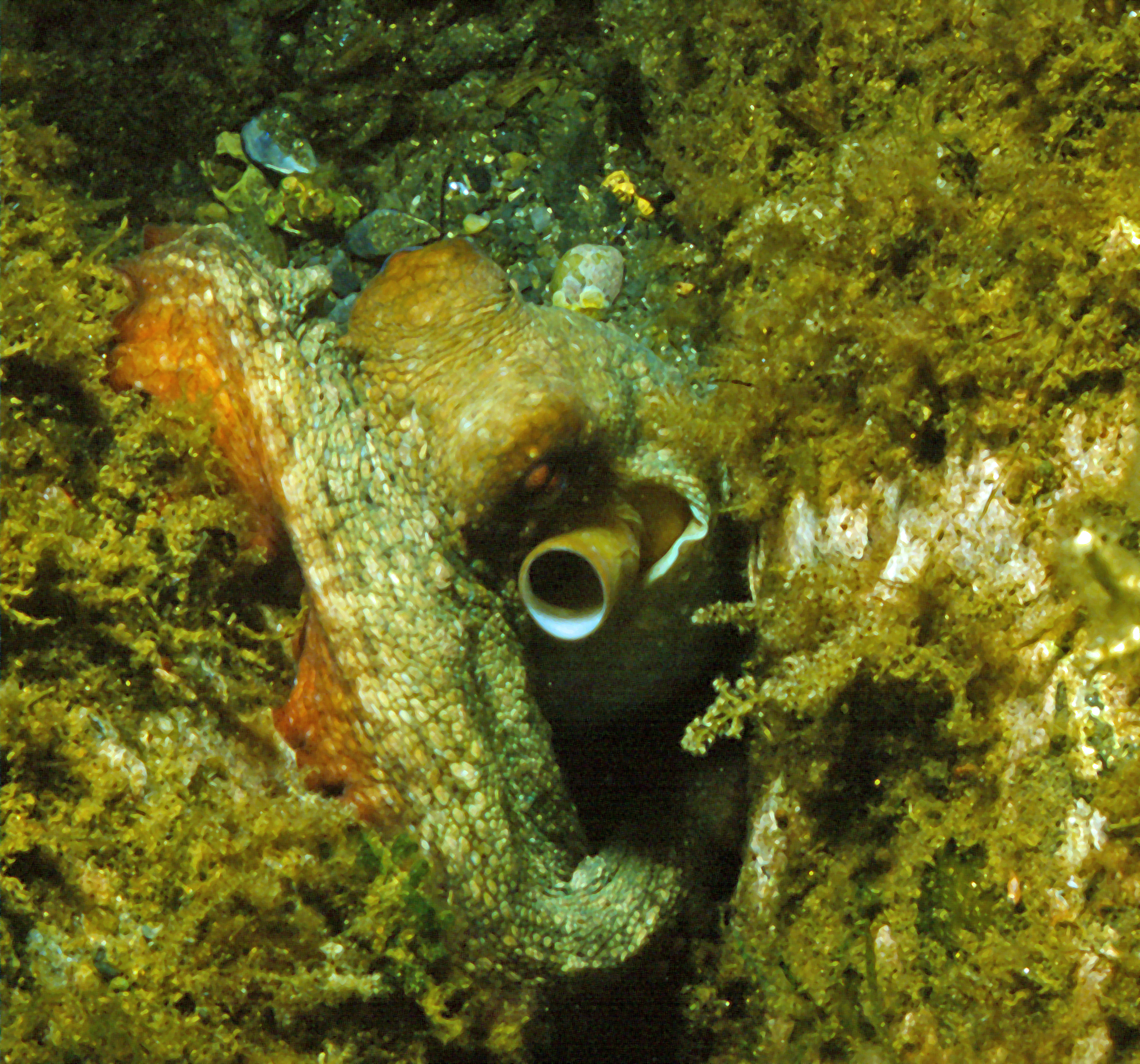 Octopus vulgaris Cuvier, 1798 - Banyuls-sur-Mer : 09/81